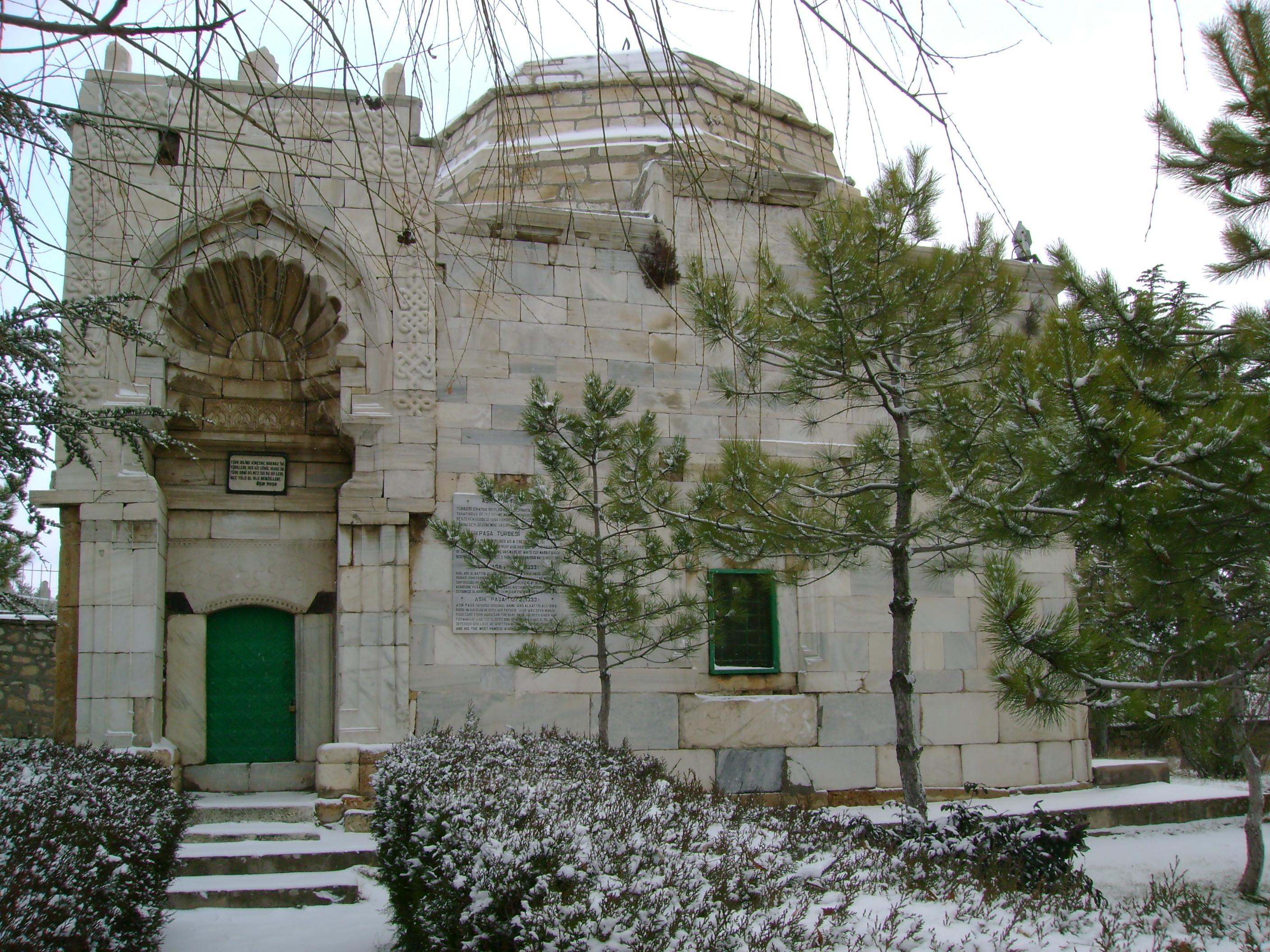 Aşık Paşa Türbesi - Tomb Of Ashik Pasha